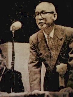 中島清次郎講演中